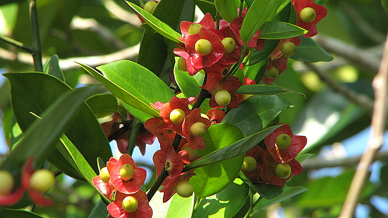 Heisteria perianthomega (Vell.) Sleumer